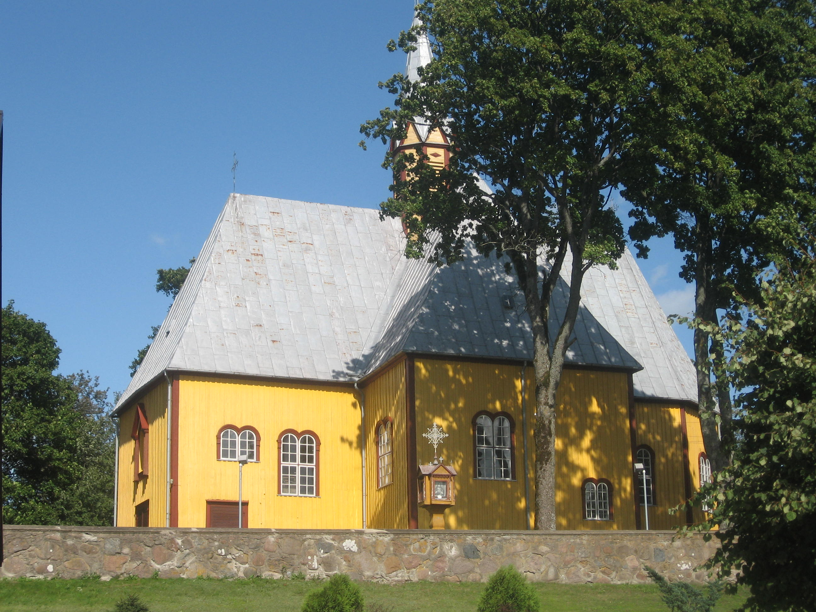 Katalikų bažnyčia Žem. Naumiestyje